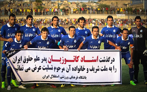 دیدار تیم های فوتبال نفت مسجدسلیمان و استقلال تهران بعدازظهر پنج شنبه با نتیجه دو بر صفر به نفع تیم استقلال به پایان رسید.